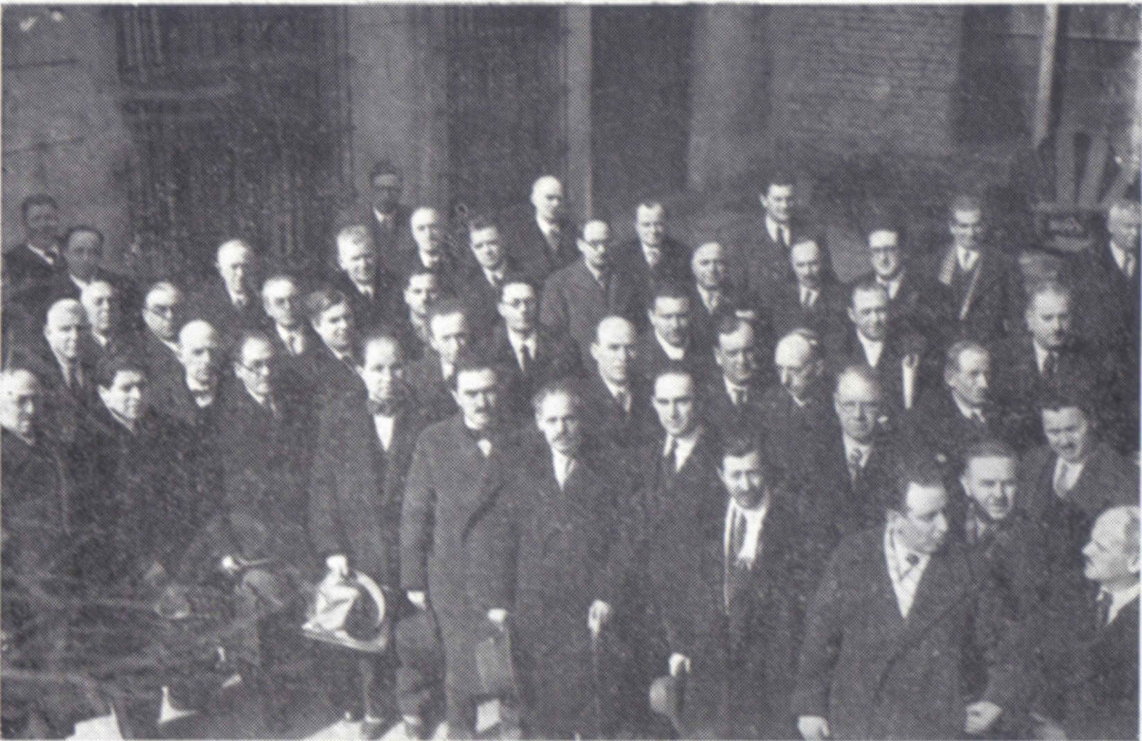 מושב הקונסיסטוריה היהודית של בולגריה ב-1932 צולם בידי אלמוני